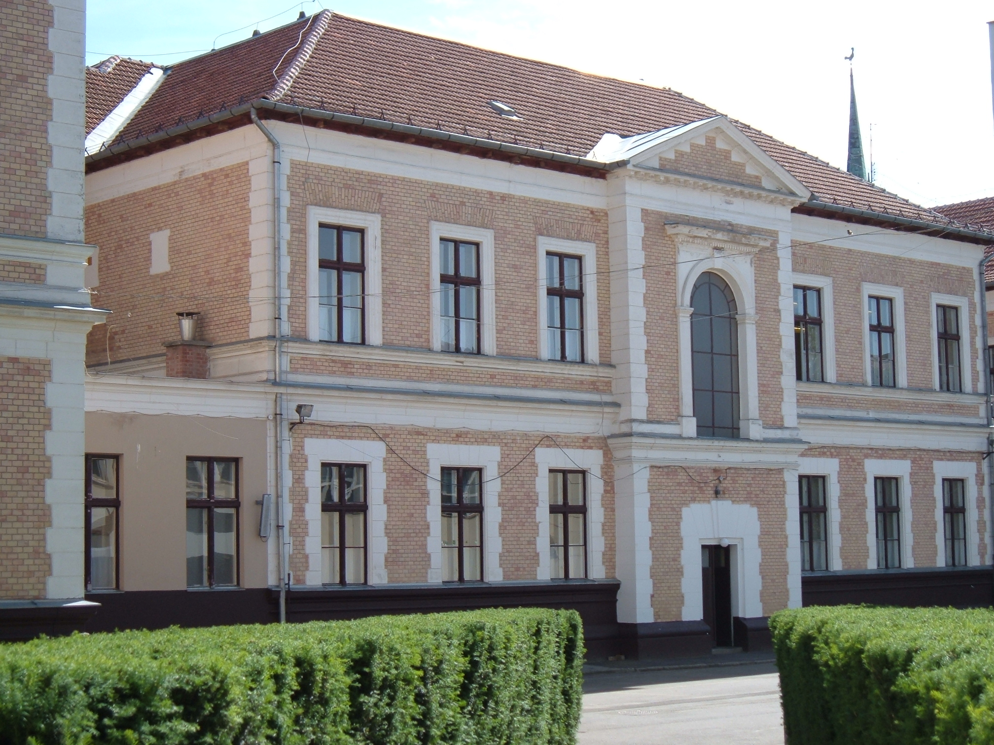 A szolnoki Verseghy Ferenc Gimnázium épületének hátsó homlokzata